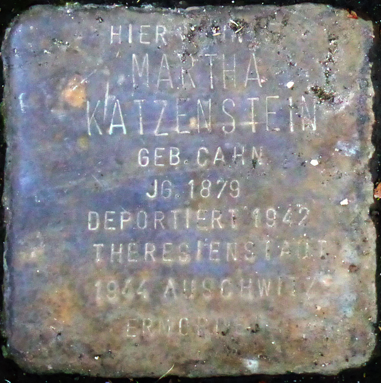 Stolperstein Martha Katzenstein, Raschdorffstraße 172Köln Text: HIER WOHNTEMARTHA KATZENSTEINGEB. CAHNJG.1879DEPORTIERT 1942THERESIENSTADT1944 AUSCHWITZERMORDET